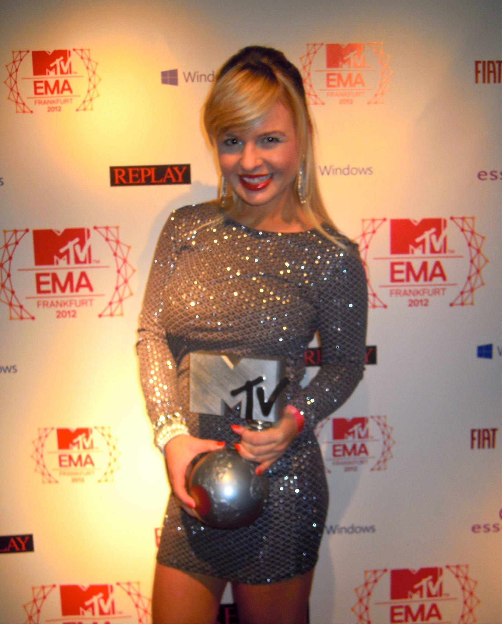 Julia Porath bei den EMA´s 2012 in Frankfurt am Main.